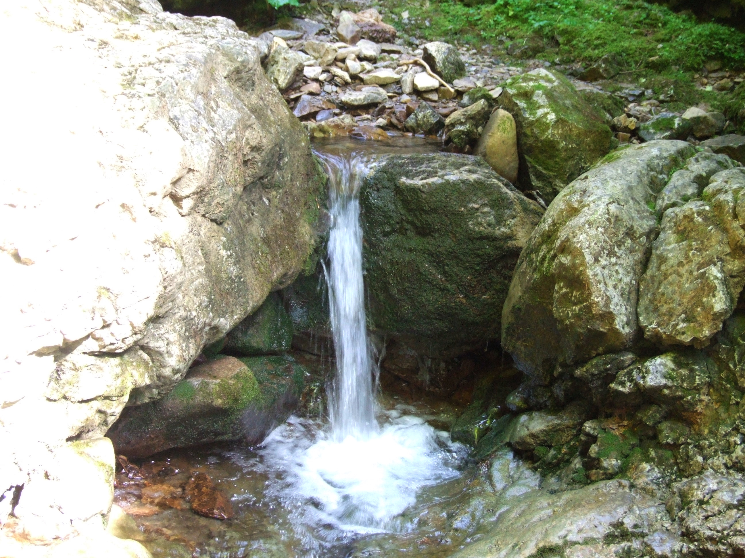 Potok Roztoka w Dolinie Roztoki (dopływ Hucianki)